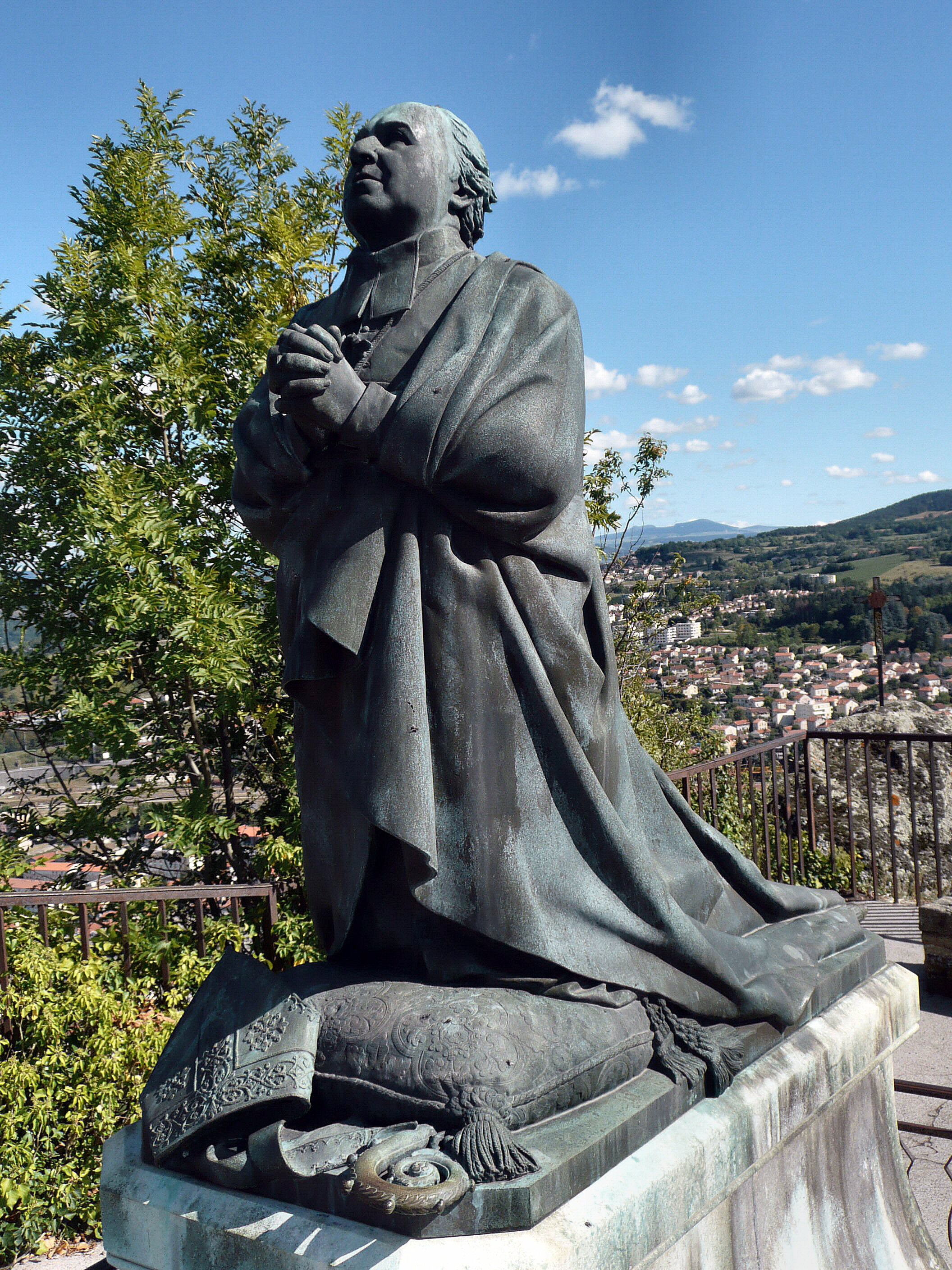 Mgr Auguste de Morlhon priant. Statue de Jean-Marie Bonnassieux érigée en 1864 sur le rocher Corneille au Puy-en-Velay, près de la statue de Notre-Dame de France